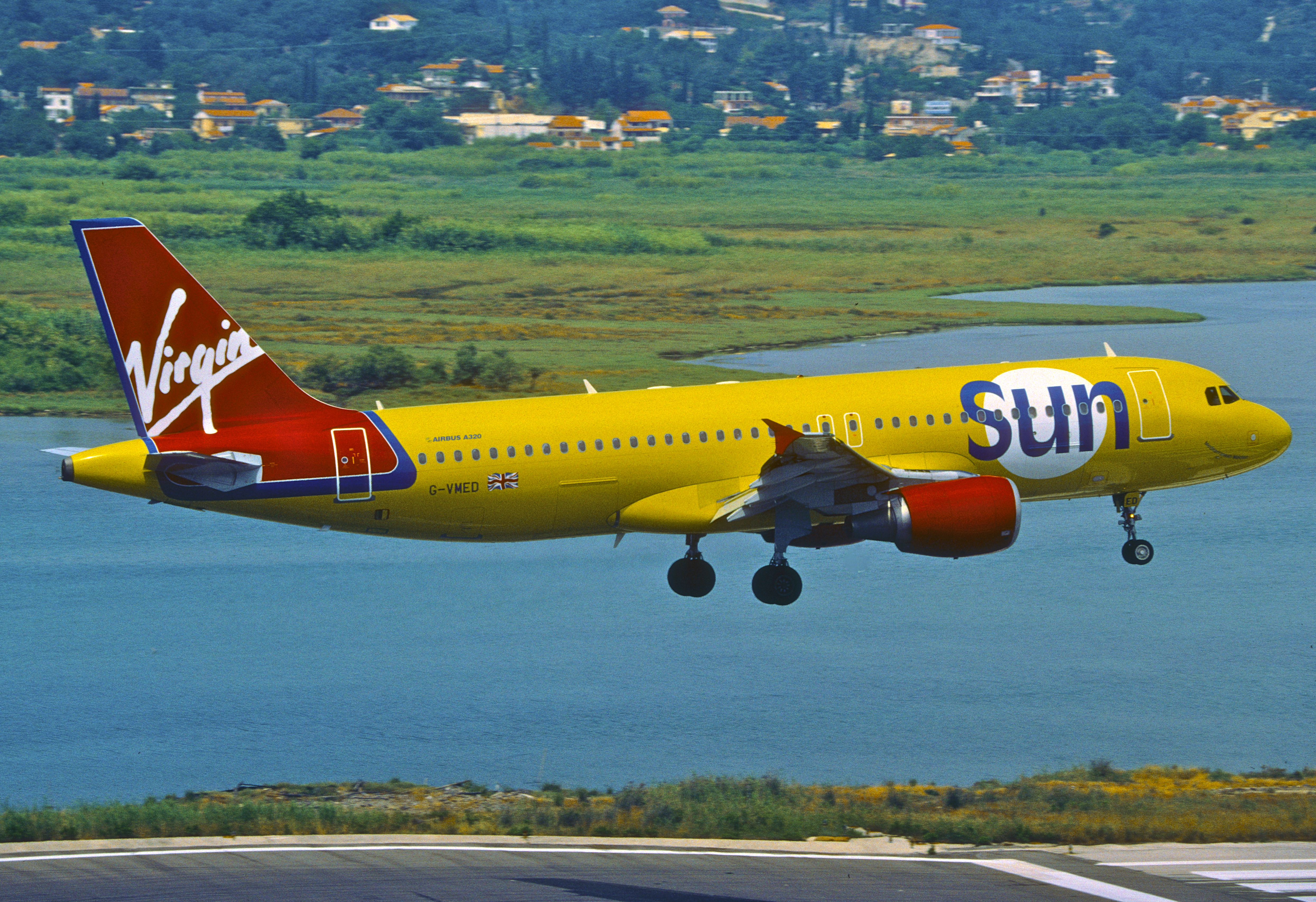 Virgin Sun Airbus A320-214; G-VMED, June 2001